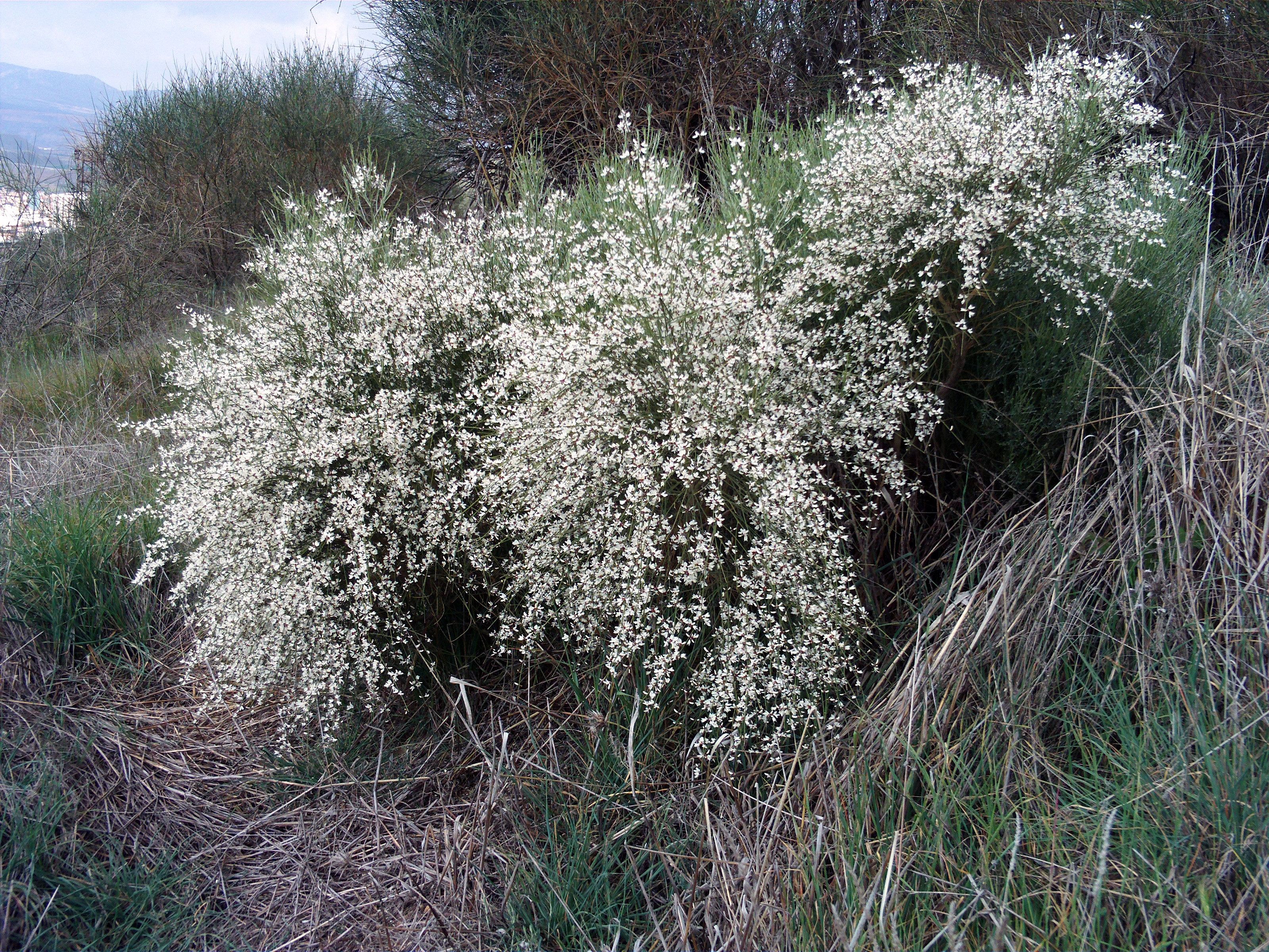 Retama monosperma plant in flowers, Dehesa Boyal de Puertollano, Spain